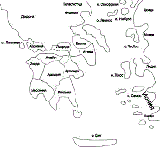 Места проживания Пелагсов и Лелегов